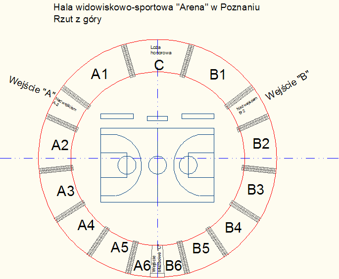 Hala widowiskowo-sportowa "Arena" w Poznaniu. Rzut z góry